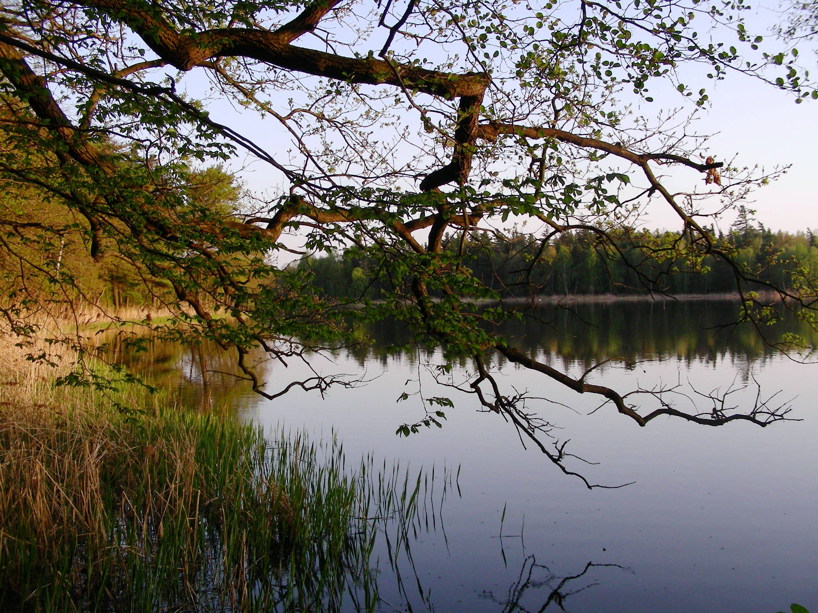 Staw Zofia - Zespół Przyrodniczo-Krajobrazowy Lipno, gmina Niemodlin, województwo Opolskie, Polska